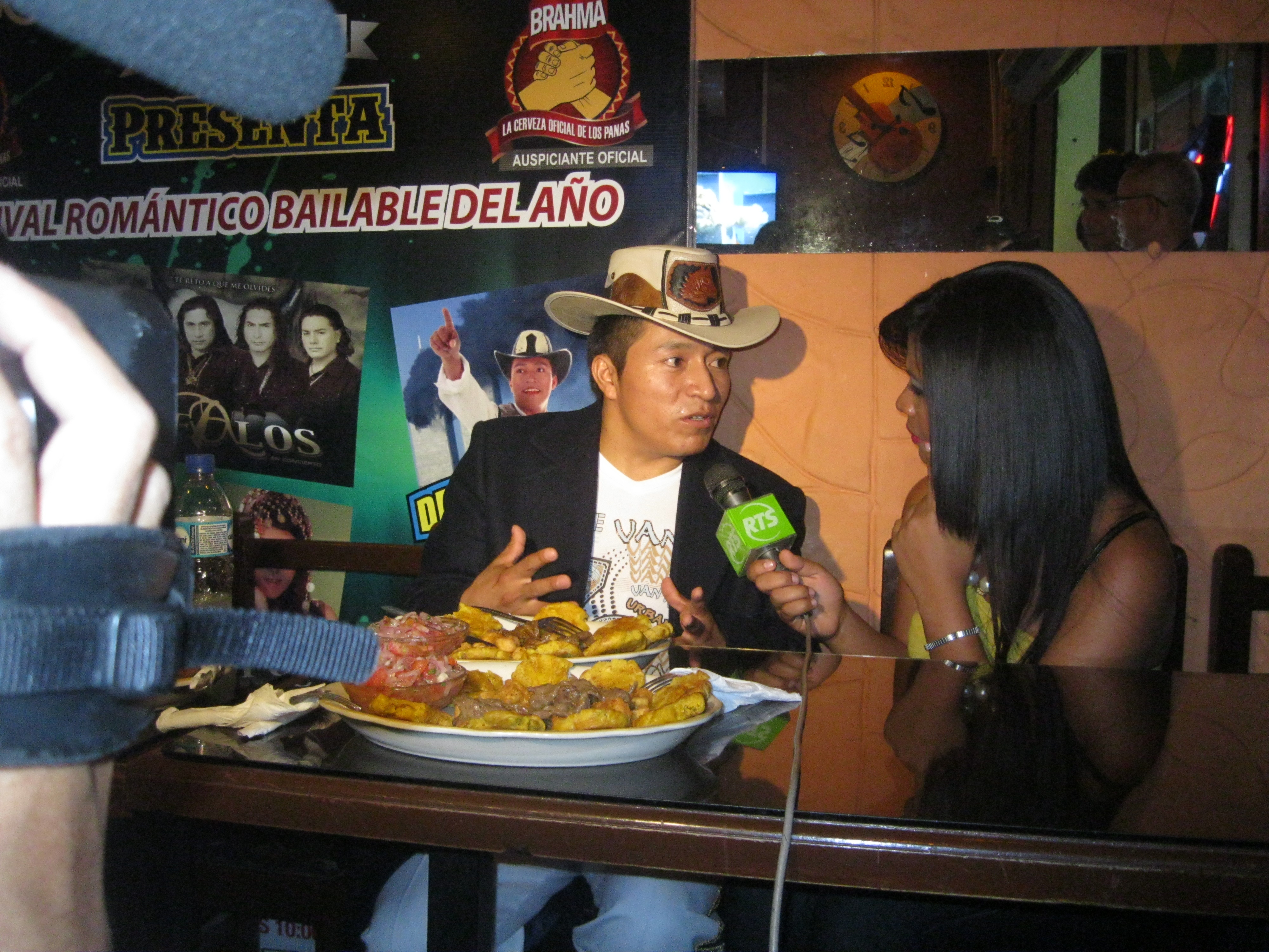 Delfín Quishpe en una entrevista realizada por RTS para el programa matutino, El Club de la Mañana, en una cebichería del centro de Guayaquil, el 13 de septiembre de 2012.